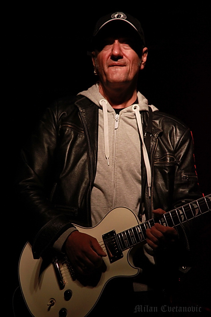 Vlatko Stefanovski (Mali Iđoš, Vojvodina, Serbia)